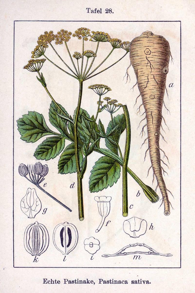 Pastinaca sativa L. Original Description Echte Pastinake, Pastinaca sativa